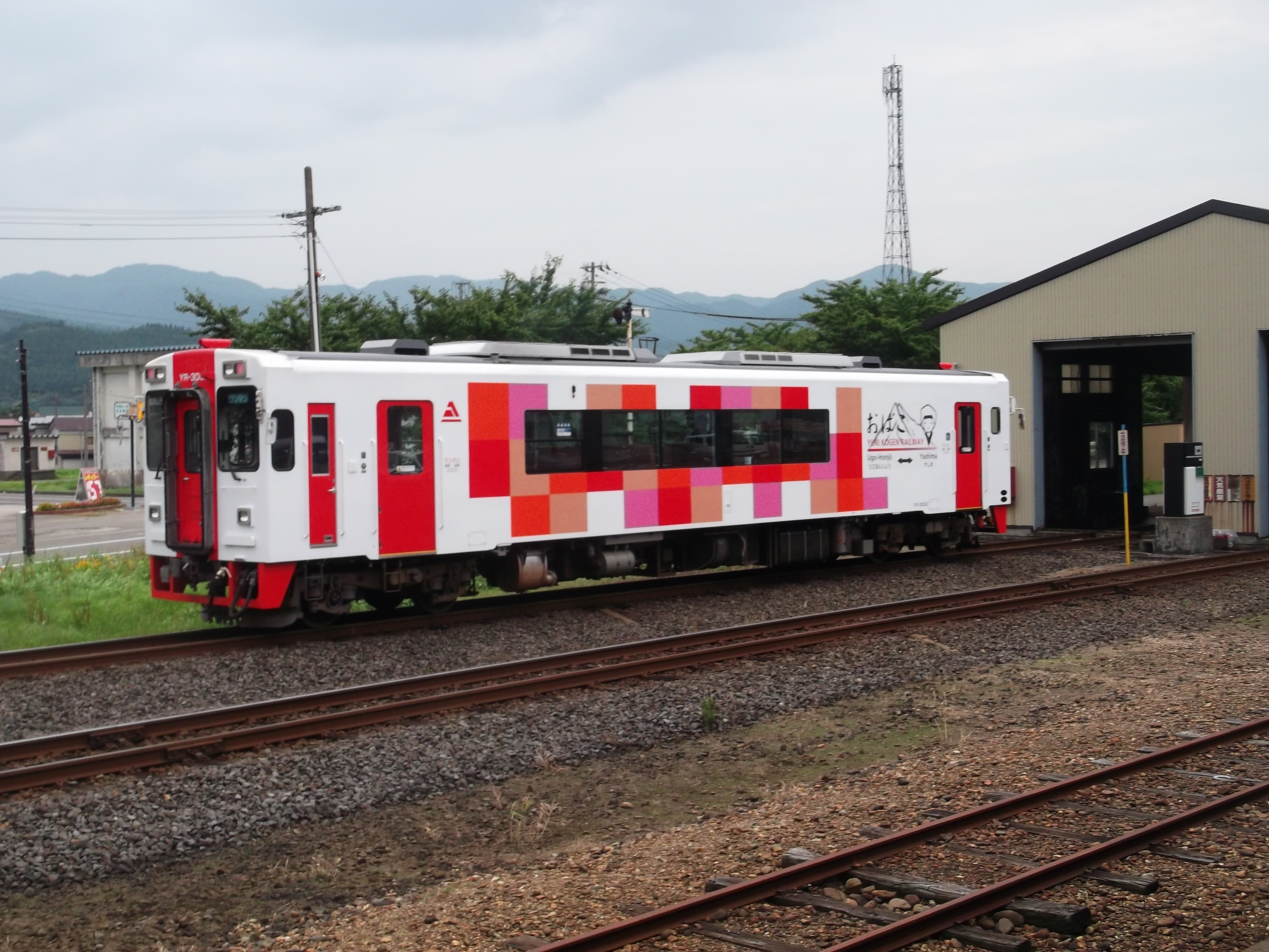 由利高原鉄道YR-3000形（YR-3002